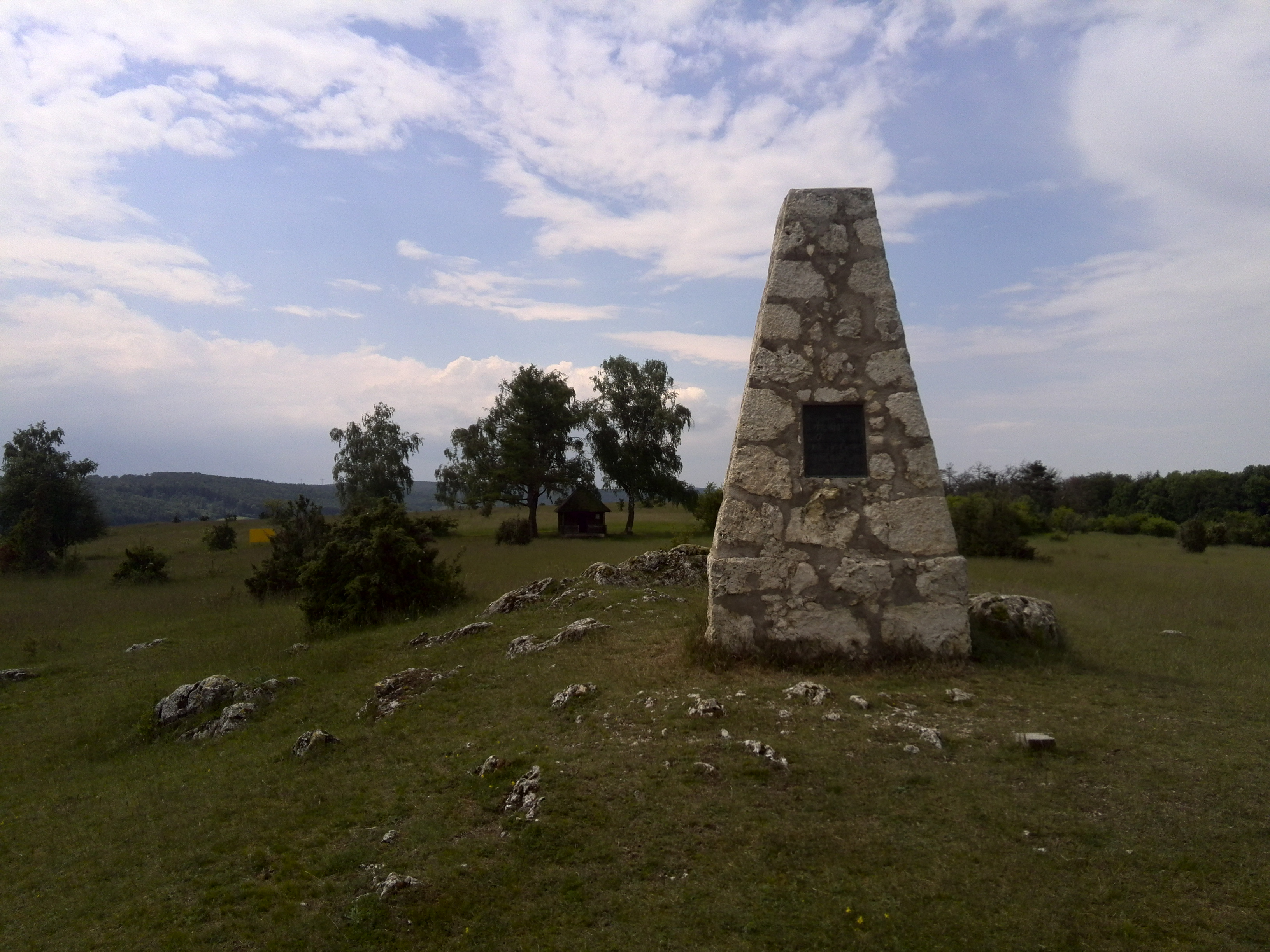 Albuch